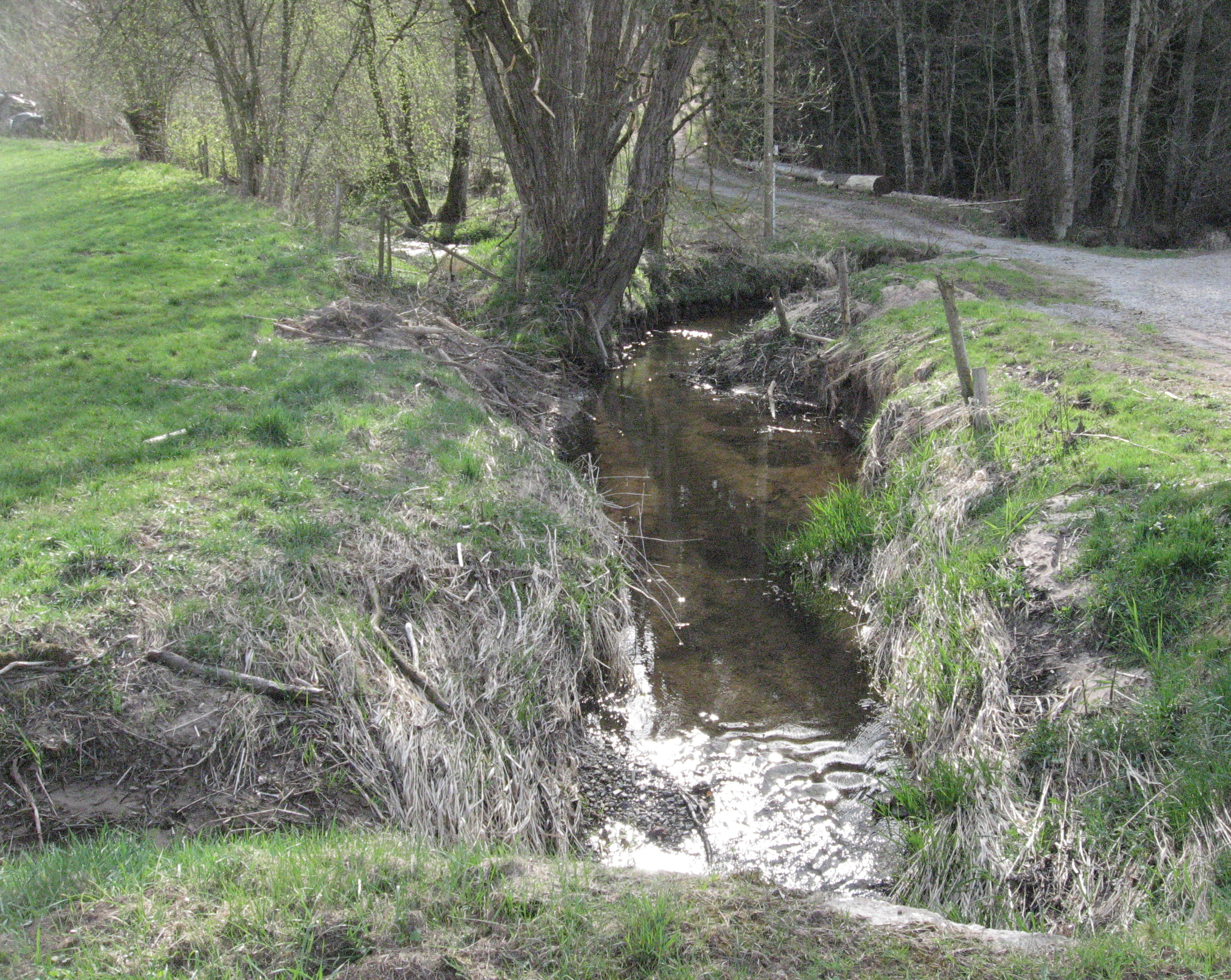 Der Klingenbach zwischen Bühlerzell-Heilberg und Bühlerzell-Hölzle von der K 2632 gesehen, die er in einem Rohr unterquert, um dann den Hambach aufzunehmen. Augenscheinlich war bei der Aufnahme der Hambach der kräftigere Bach, in dessen Richtung auch Lauf und Tal des unteren Klingenbachs weiterlaufen. Über die Brücke führt die Heilberger Klingenbachstraße (K 2632 Heilberg–Immersberg), Fließrichtung ist nach links unten. Der Klingenbach unterquert den beginnenden Waldweg im Bildhintergrund, den merklichen Zufluss von links hinten längs der Ufergehölzreihe in ihn kennt die TK25 nicht.